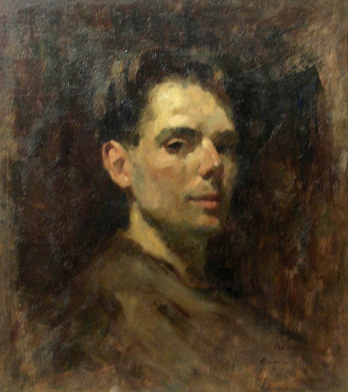 semnat dreapta jos cu negru, ulei pe pânză, datat şi localizat Roma 1921